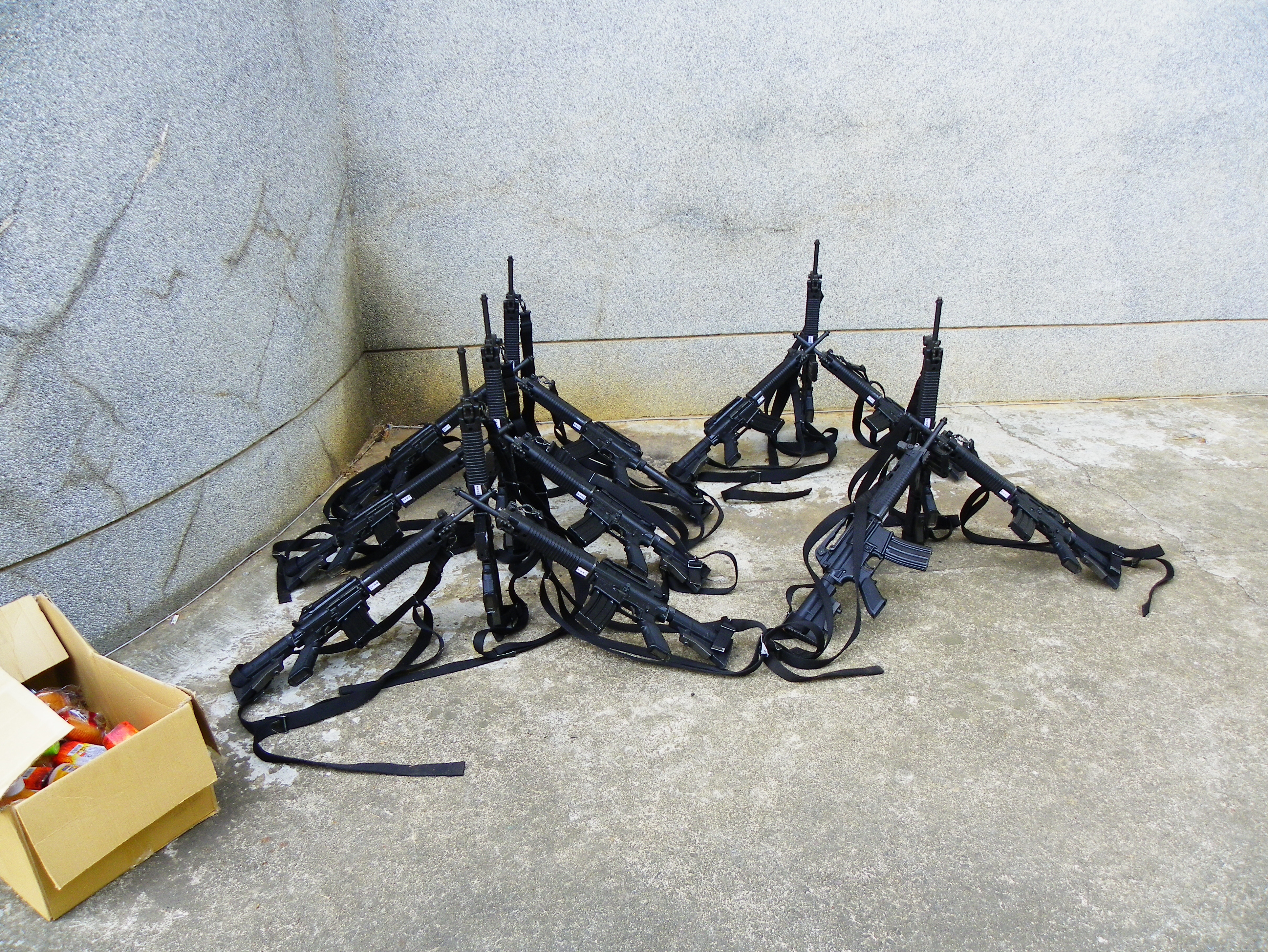 2011年陸軍湖口營區開放活動，午後置於中興臺東側通道地面的86式戰鬥步槍三角架群，旁有警衛監視。